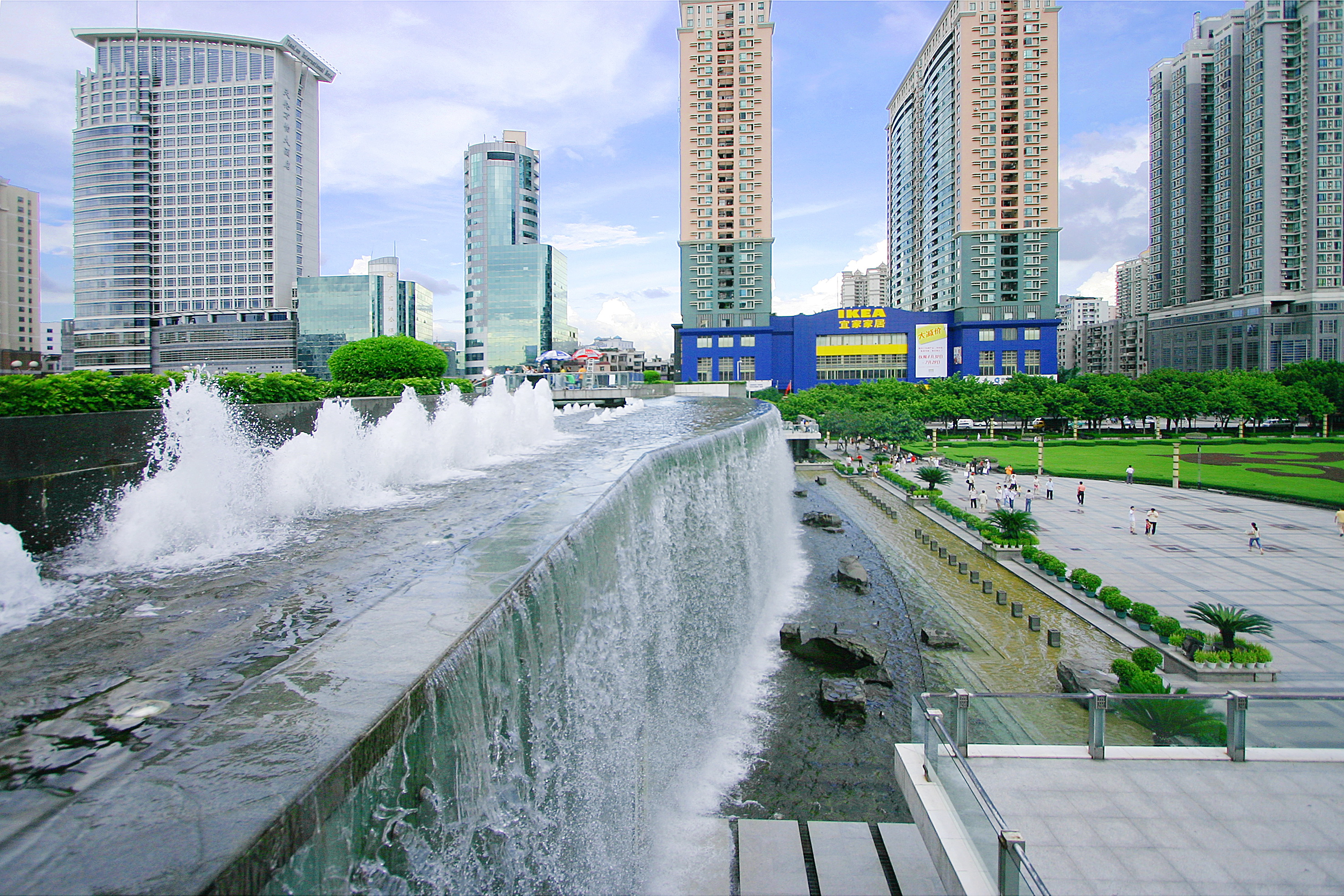 广卅，东站广场，天河飘绢